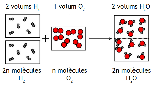 Síntesi de l'aigua segons Amedeo Avogadro